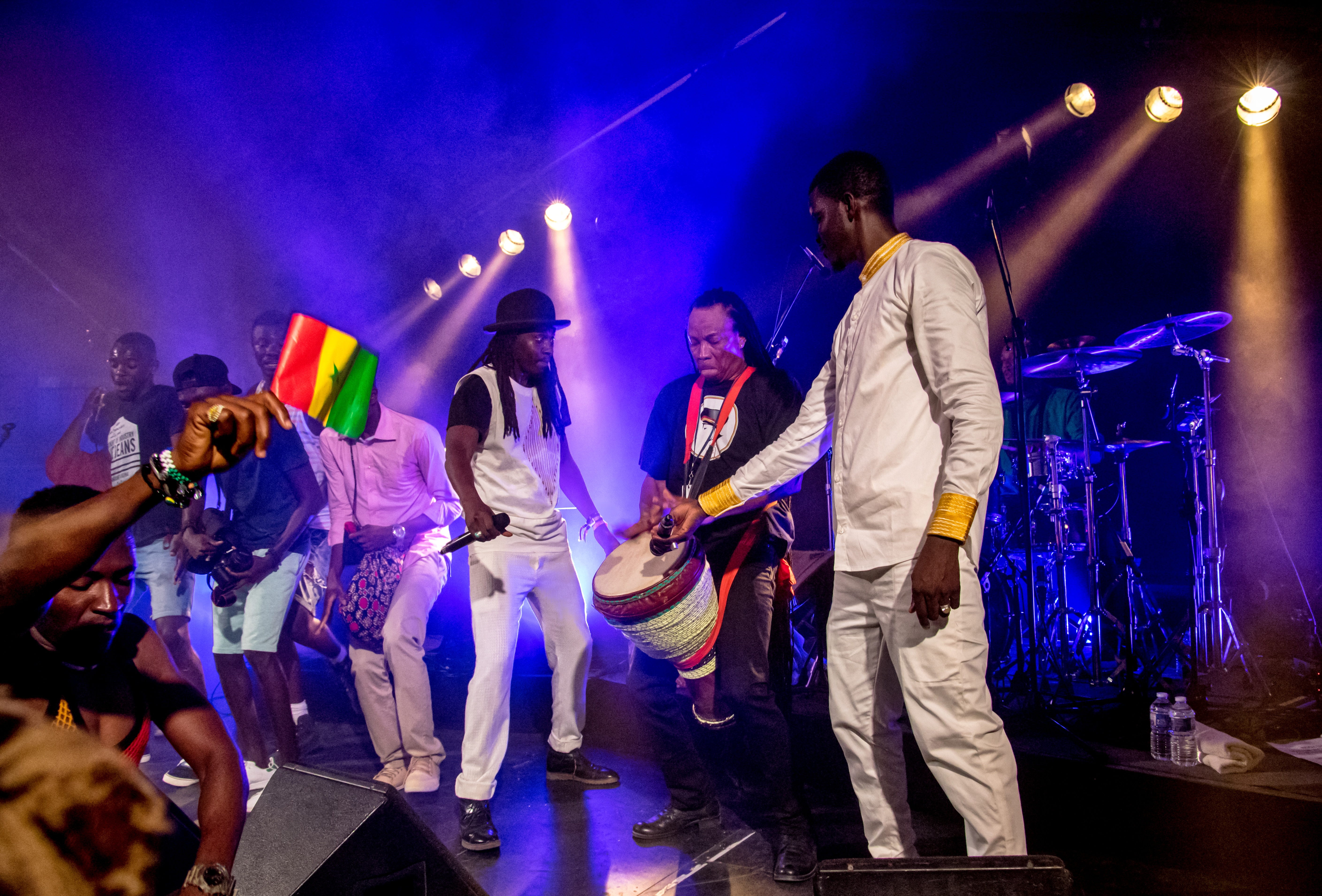 Bilder vom Zelt Musik Festival 2018 in Freiburg im Breisgau Daara J am 29.07.2018 im Spiegelzelt